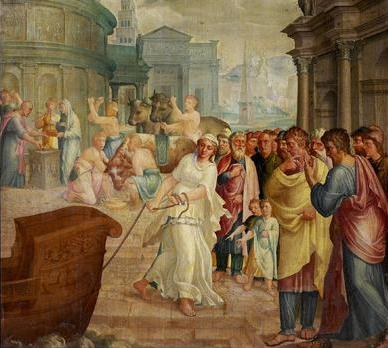 Projet d'étude et de restauration d'un cycle de huit tableaux de Lambert Lombard- La Vestale Claudia tirant le Bateau de Cybèle